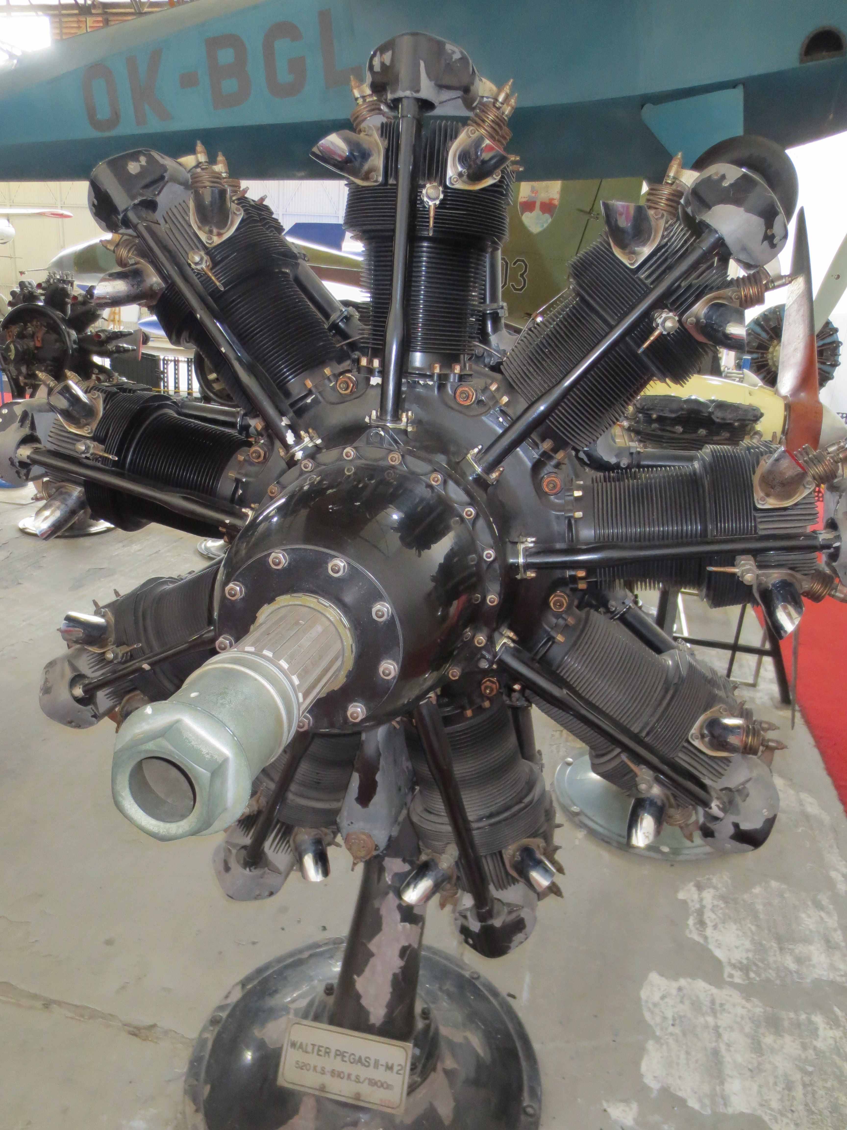 Walter Pegas II-M2 (LM Kbely)